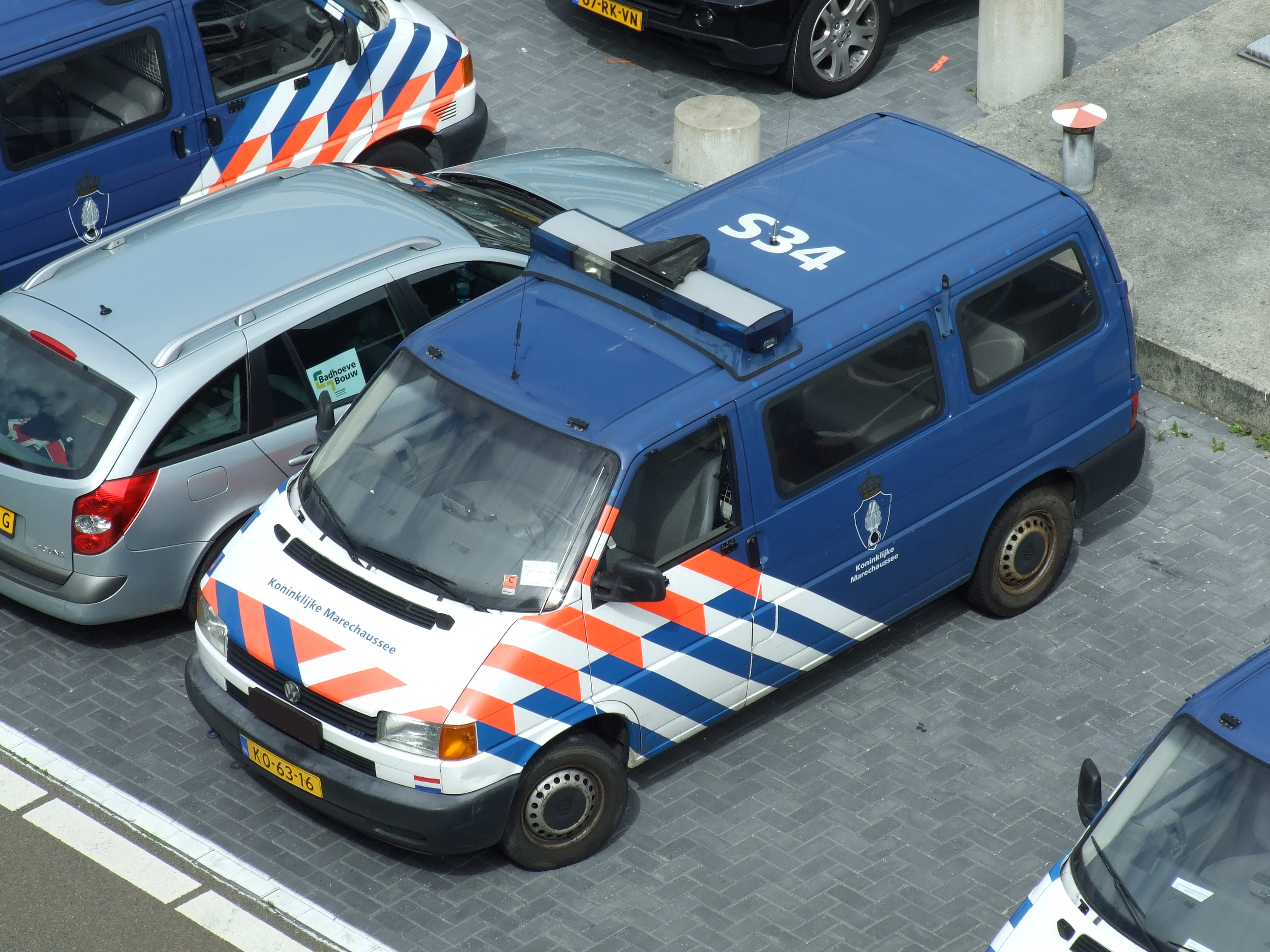 Busje van de Koninklijke Marechaussee te Schiphol